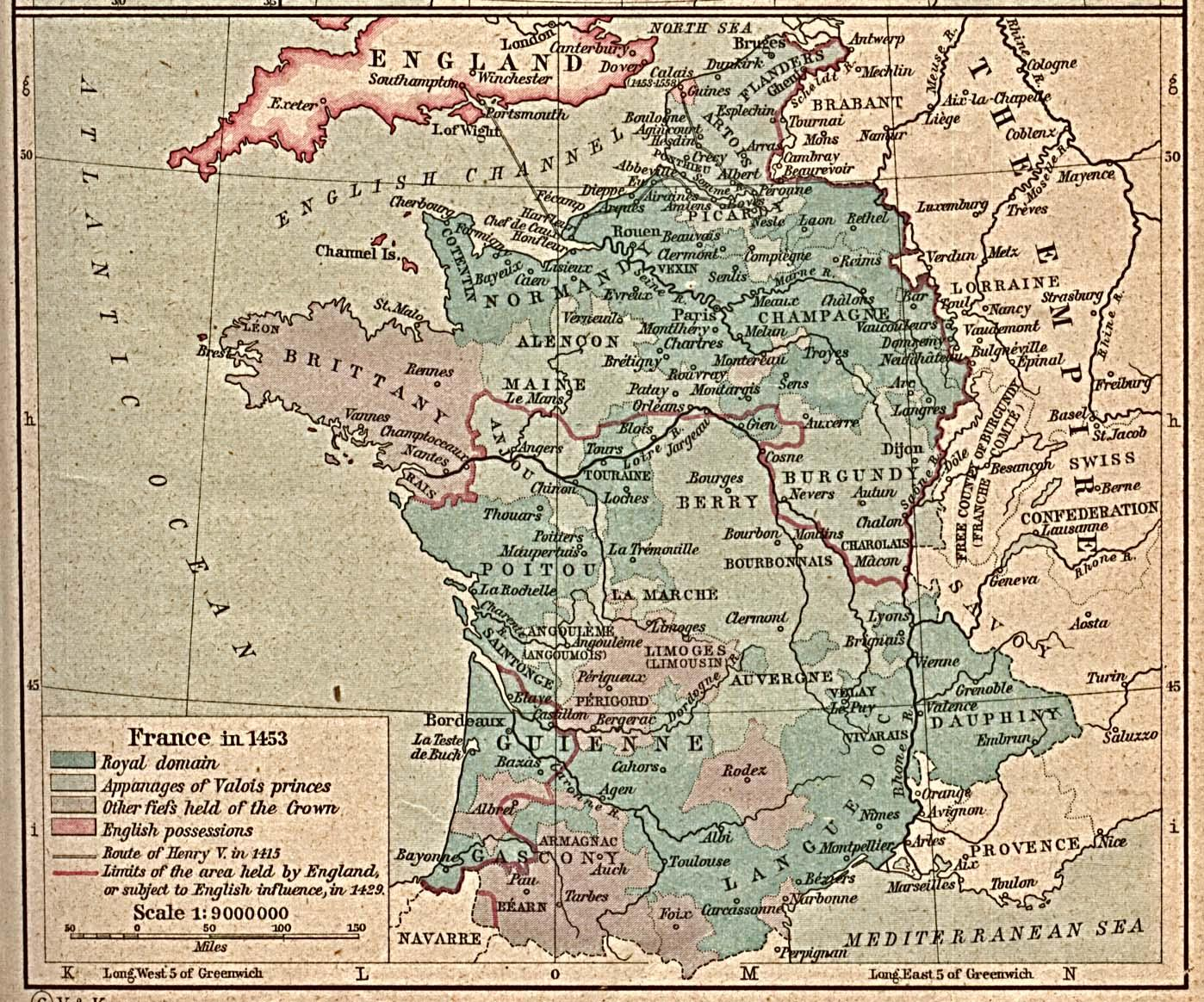 la France au 15eme siècle Licensing . Catégorie:Cartes Histoire de France